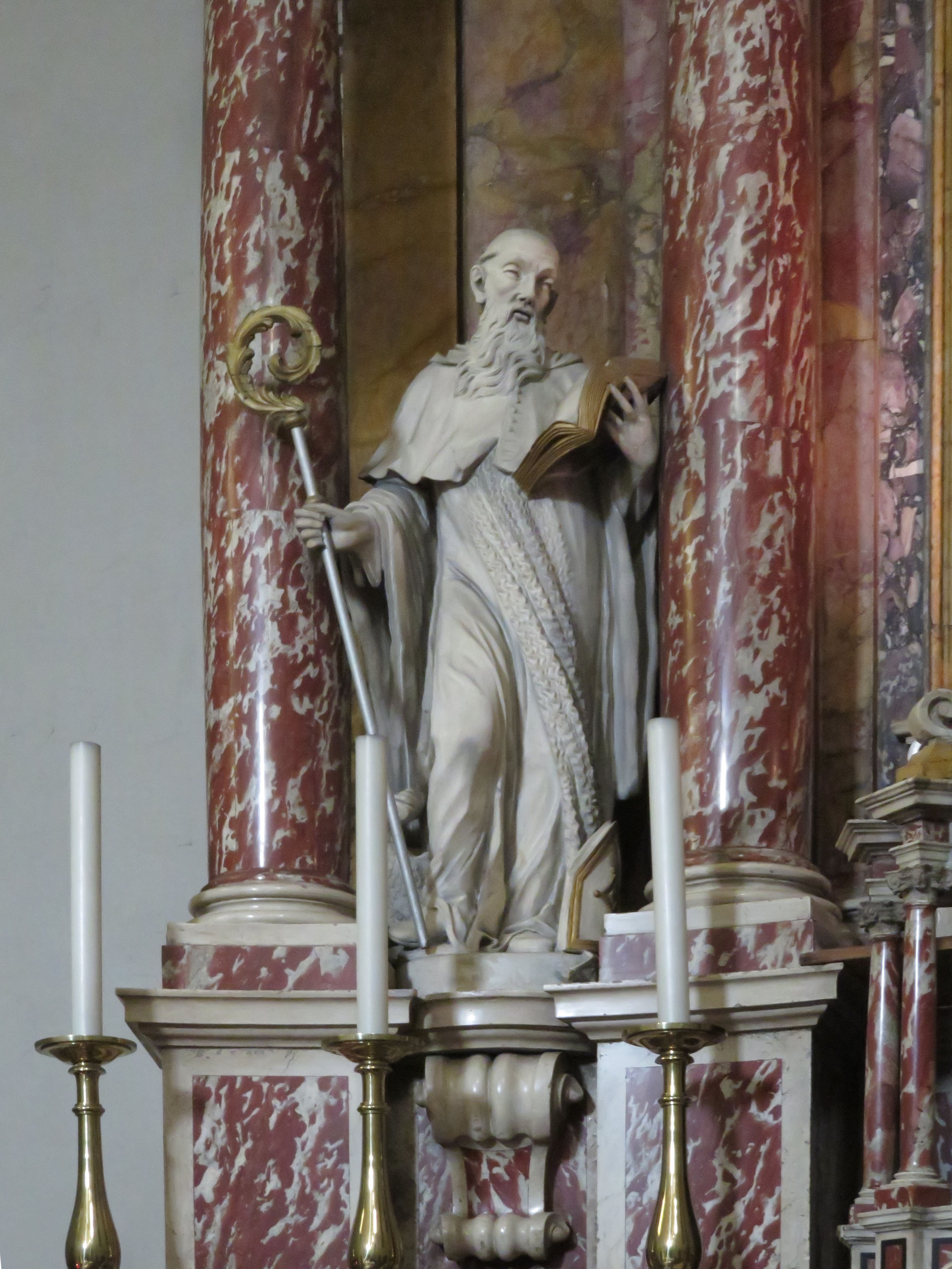 Chiesa di Loreto - Altare maggiore - particolare